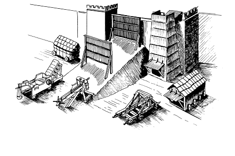 Versione senza scritte di File:Roman siege machines.gif